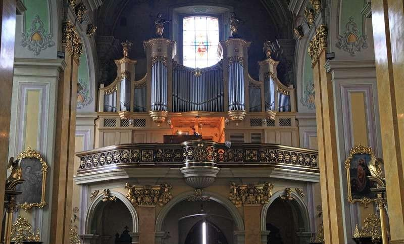 Katedra w Przemyślu